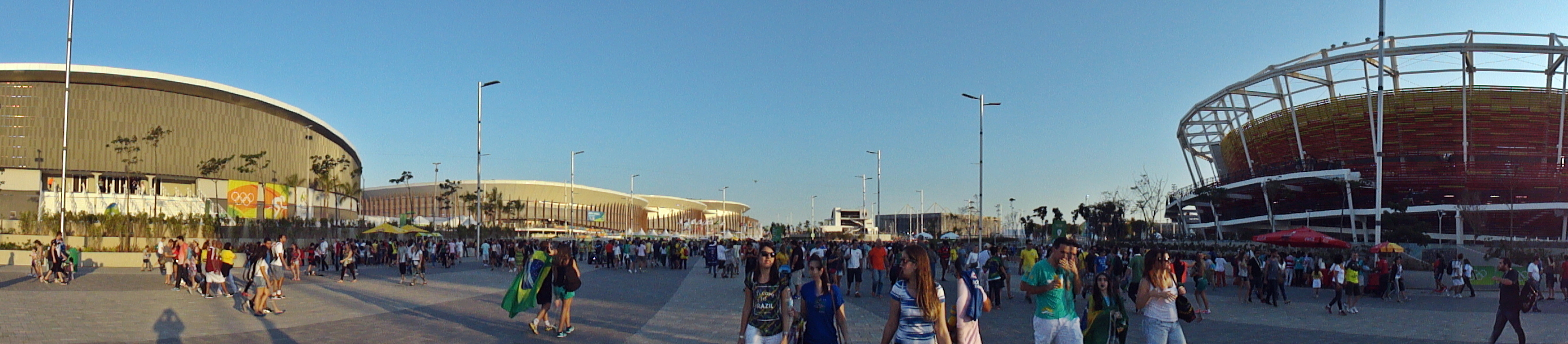 Um Mundo Novo!